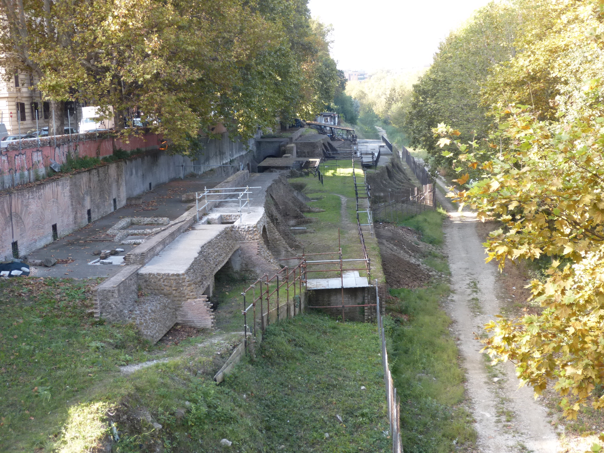 Roma, lungotevere Testaccio. Scavi dell'Emporium.